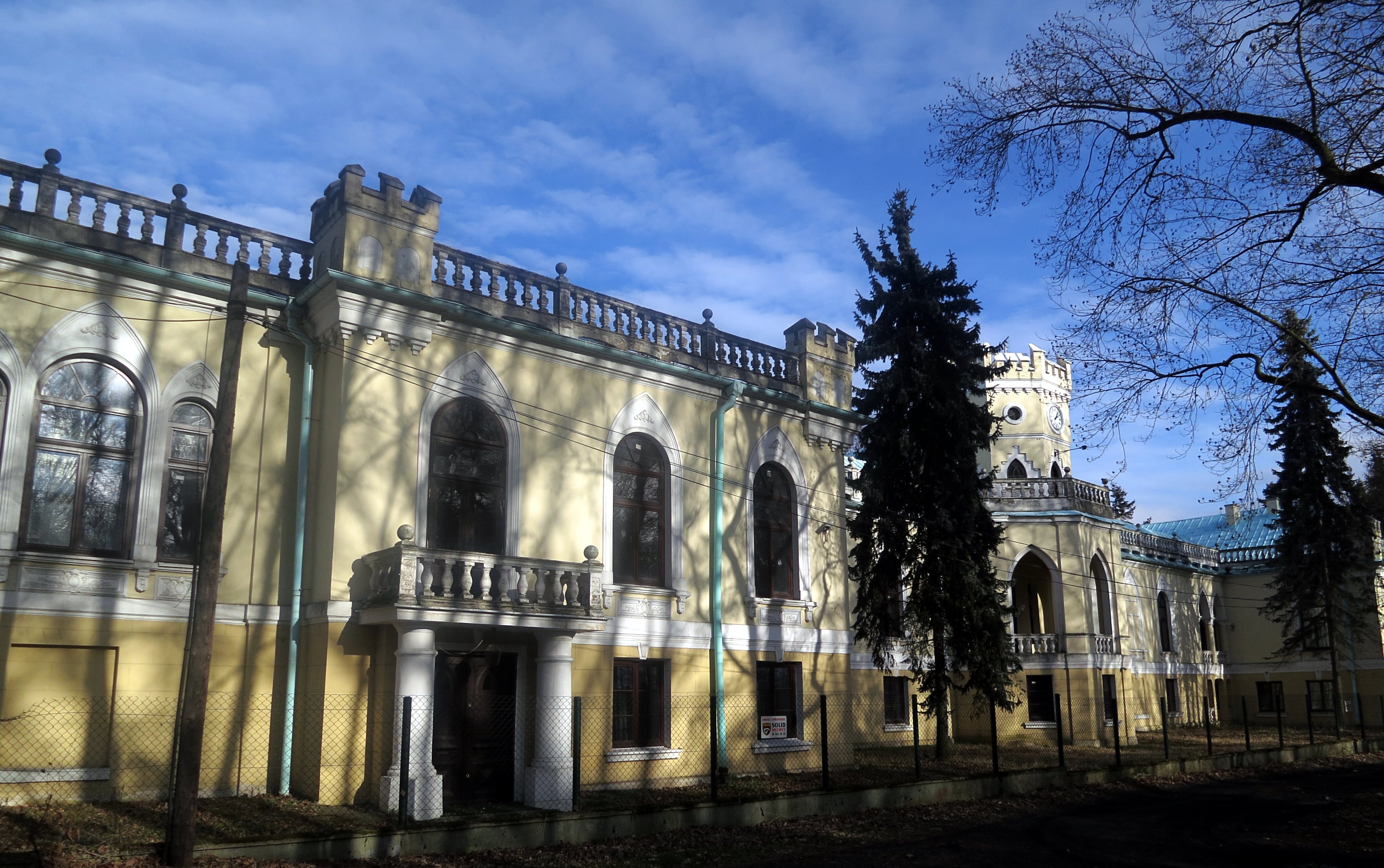 Kłobuck, pałac, 1795-1800, 1861